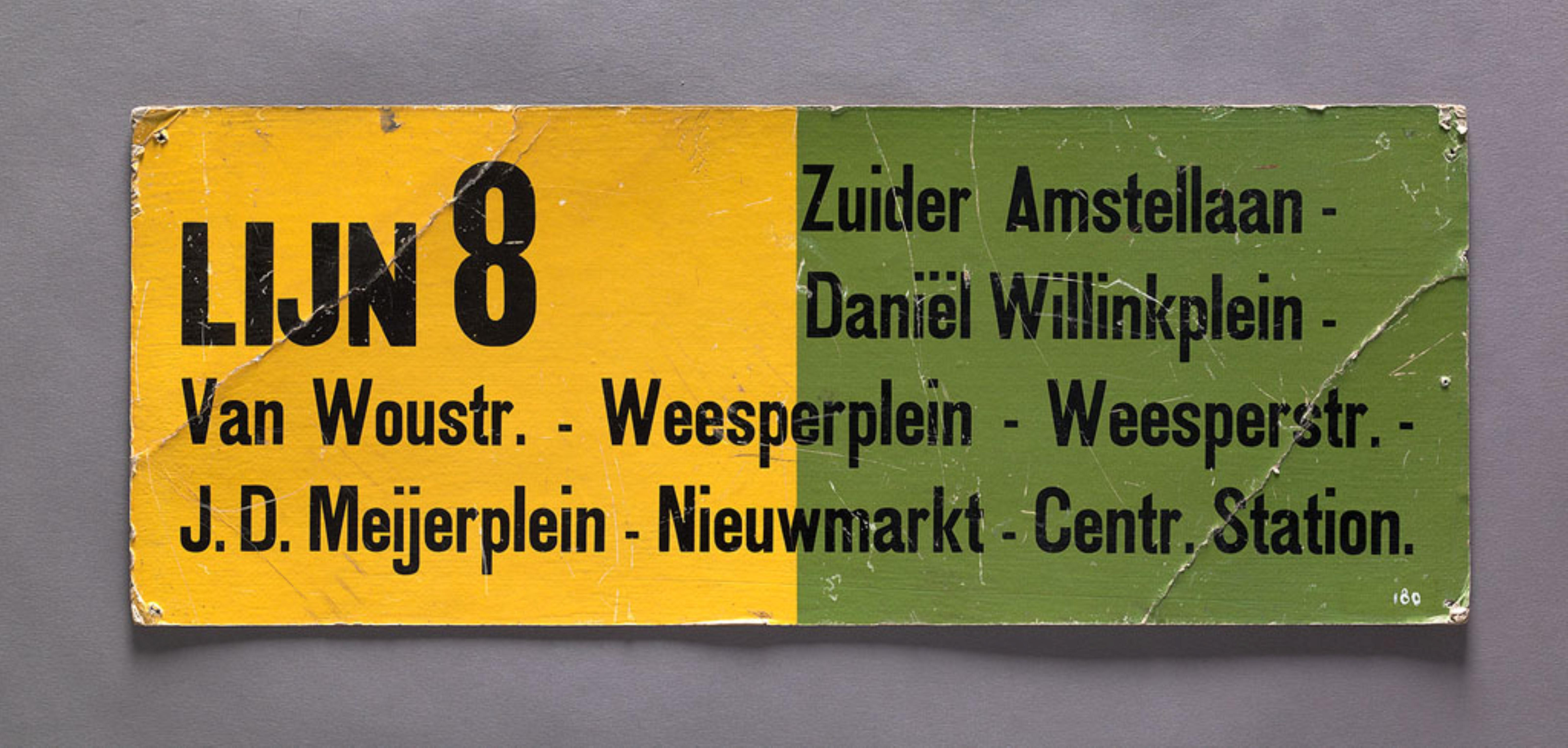 Eind 2010 heeft het Amsterdam Museum dit historische trambordje in de collectie opgenomen. Het bordje hing in tram 8, in de volksmond de ‘jodentram’ geheten, omdat die door alle Amsterdamse buurten reed waar Joden woonden. In 1942 werd de lijn opgeheven. Dit kwam niet alleen door personeelschaarste, maar het was ook een direct gevolg van het verbod door de Duitse bezetters voor Amsterdamse Joden om van het openbaar vervoer gebruik te maken. Door dit besluit verloor lijn 8 het grootste deel van haar reizigers. Na het afschaffen werd het spoor gebruikt om Joden op transport naar de concentratiekampen te zetten. Om die reden heeft Amsterdam tot op de dag van vandaag geen tram 8 meer gekend.